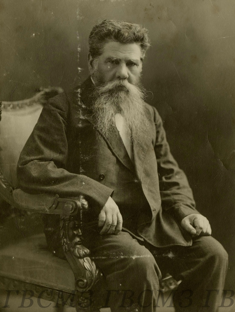 Александр Васильевич Смирнов (1854-1918), библиограф